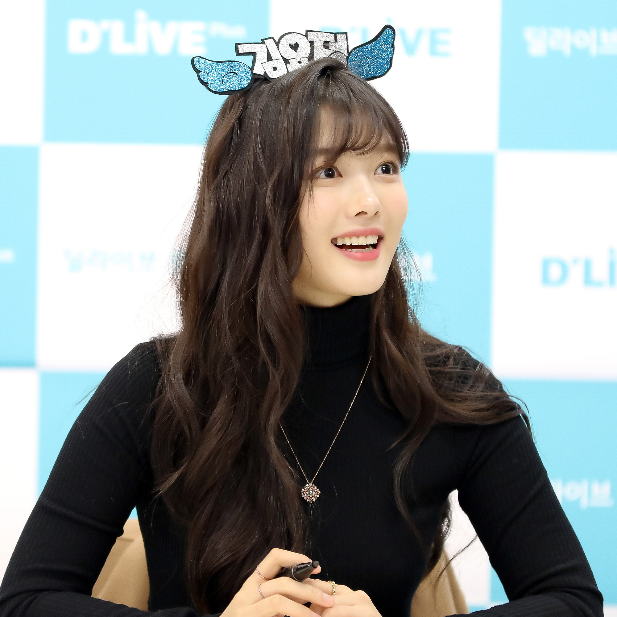 161112 김유정 팬싸인회